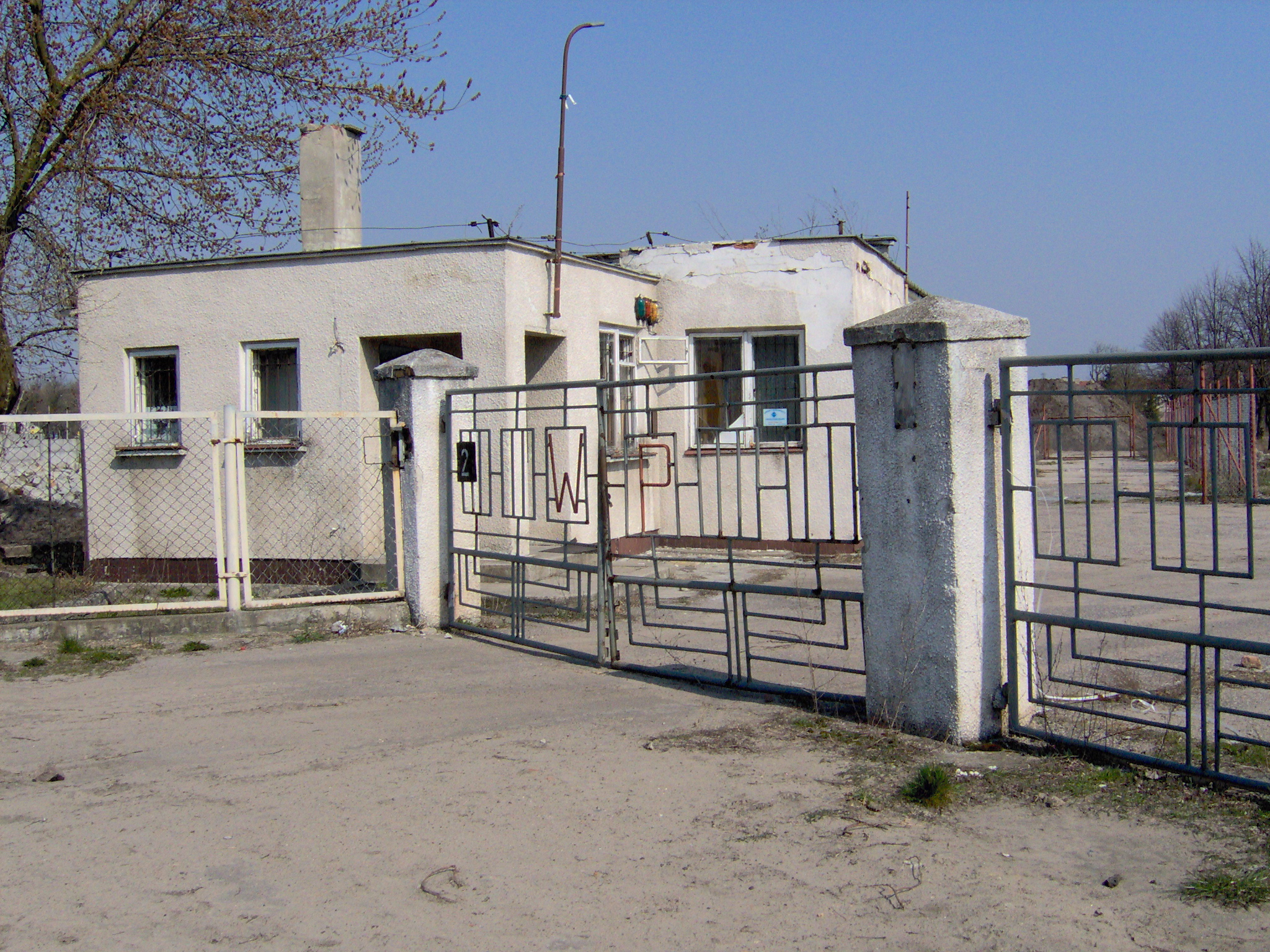 Pozostałości po bramie wjazdowej do byłej jednostki wojskowej przy ul. Żytniej 83 (brama od ul. Wojskowej - 2007 r.)